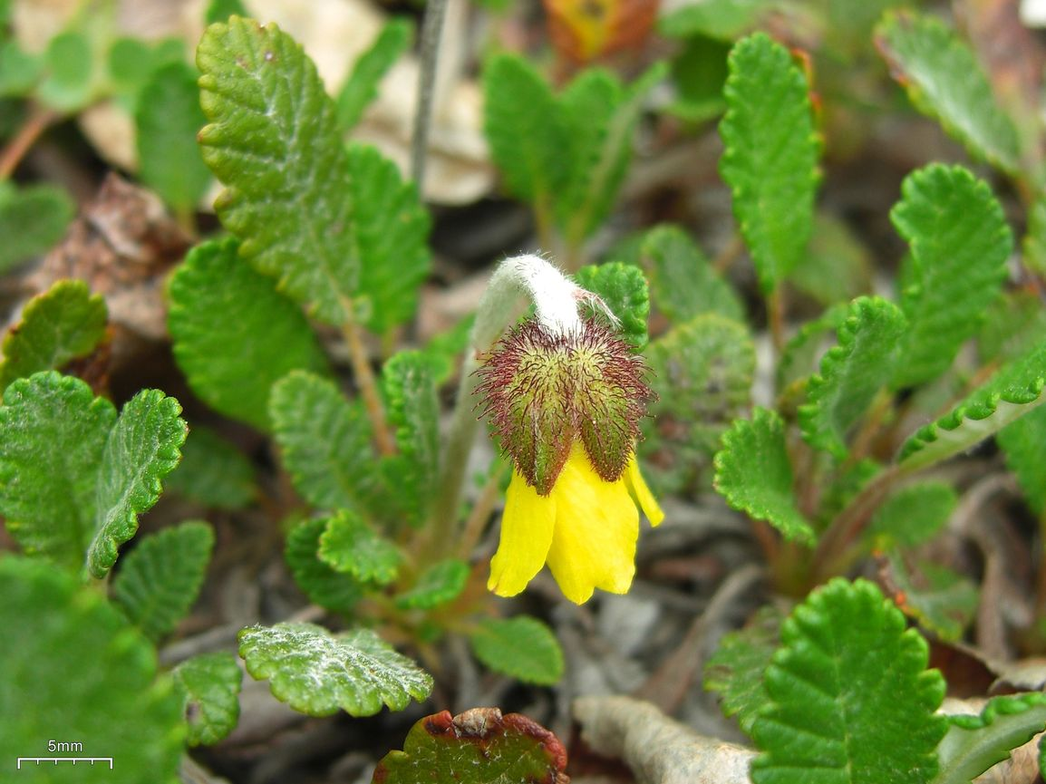 Dryas drummondii Richards 20090624.91 Mount Stearns, Willmore Wilderness, Alberta